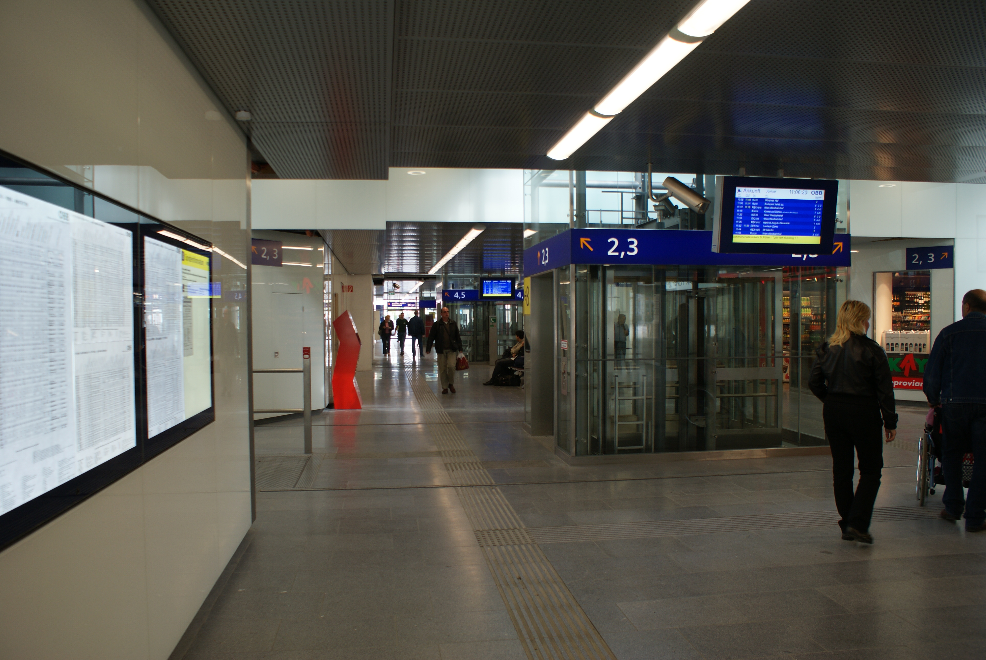 Der St. Pöltner Hauptbahnhof nach dem Umbau im September 2010